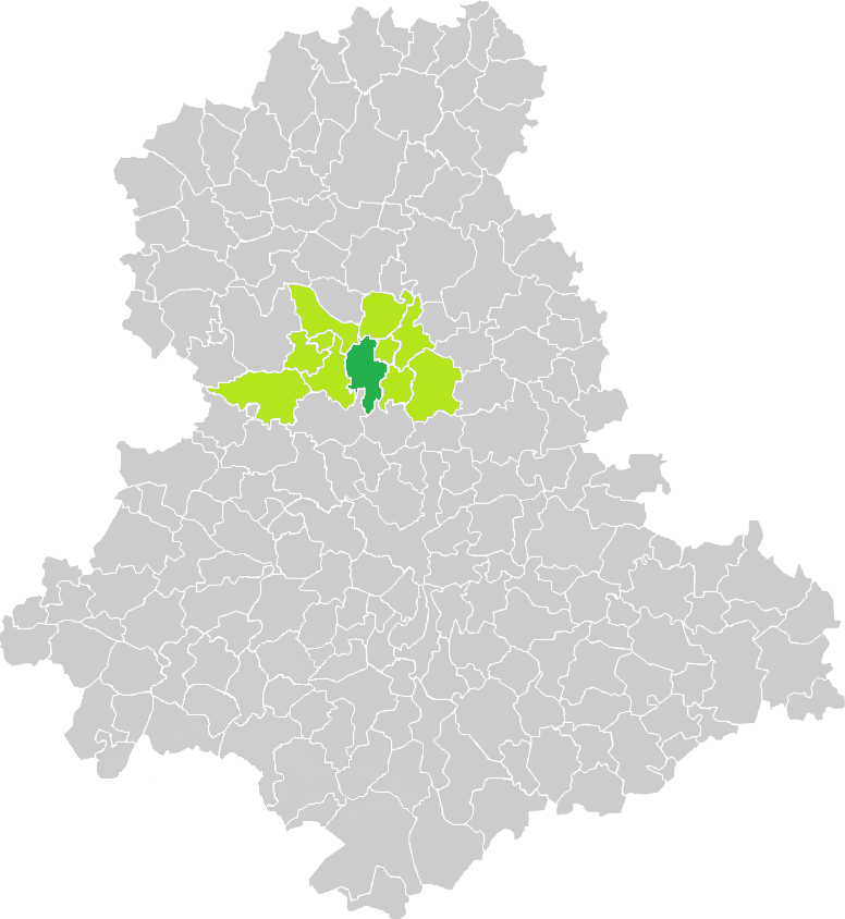 Carte de situation de la commune de Nantiat (en vert foncé) dans le votre Canton (en vert clair) sur une carte des communes de la Haute-Vienne